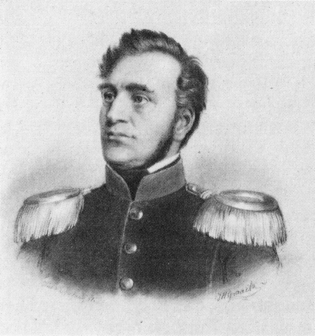 Zeichnung von J. H. Graaetz, 20. März 1851.Heinrich von Gagern als Major (Volontär-Offizier) der Schleswig-holsteinischen Armee 1850.